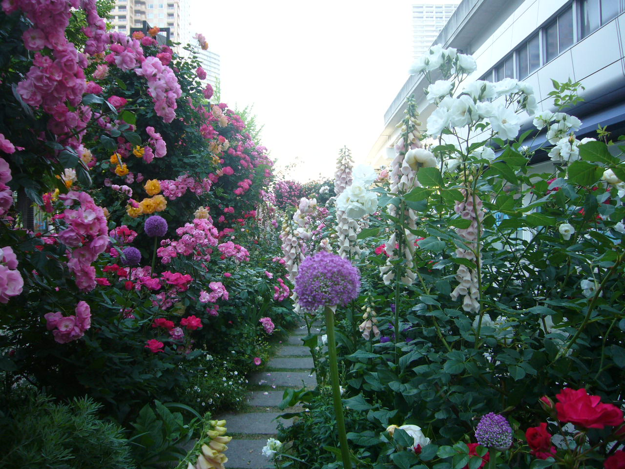 六甲アイランドリバーモール内に位置するRICローズガーデンの中。たくさんのバラが映っている。2017年5月バラ祭り時撮影。